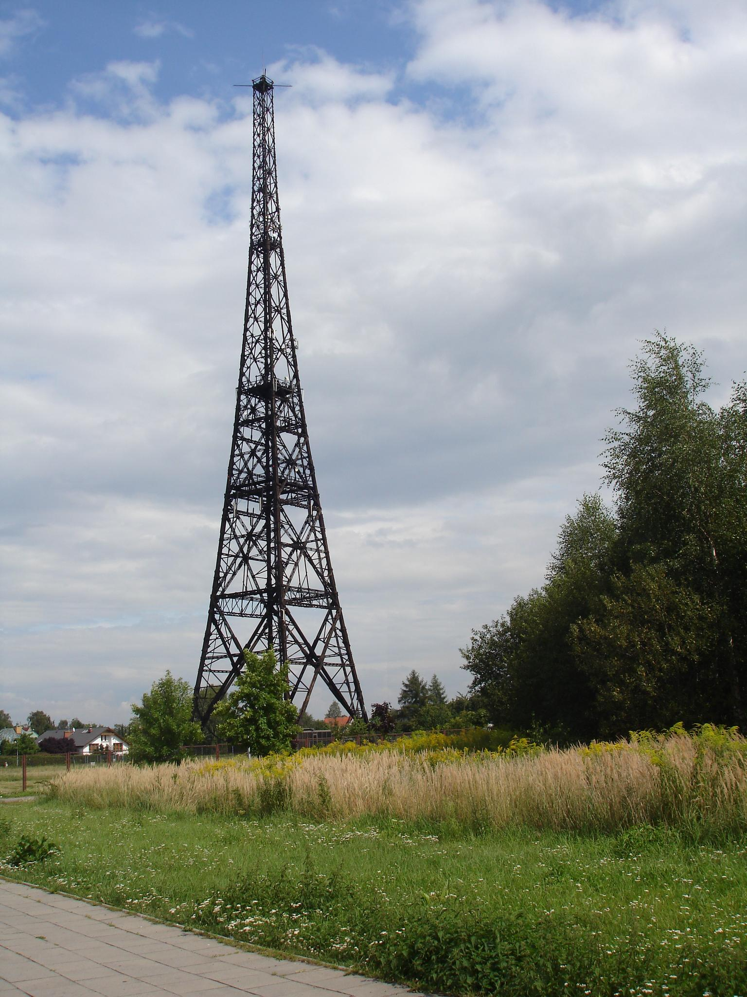 Sendeturm in Gliwice